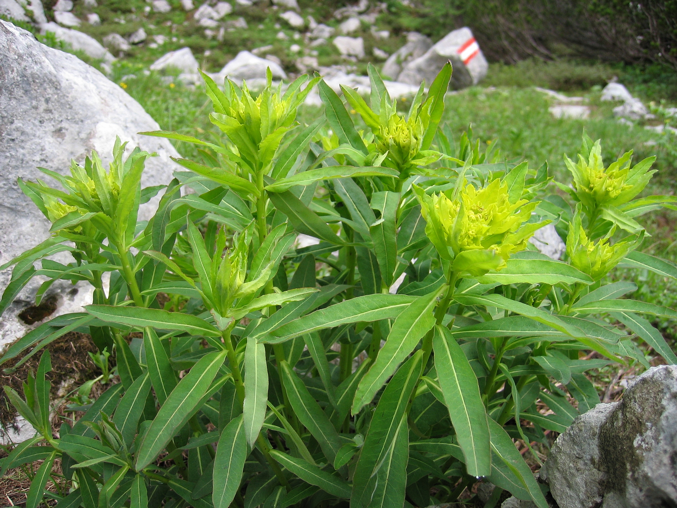 Euphorbia austriaca, Wurzeralm ~1.700 m, Upper Austria, Austria